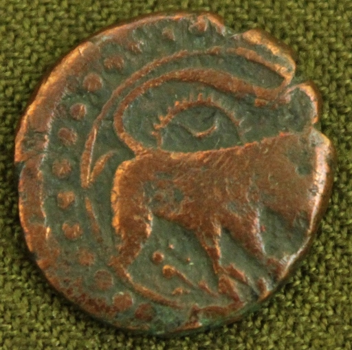 Карабахское ханство Панахабад. (Шуша).